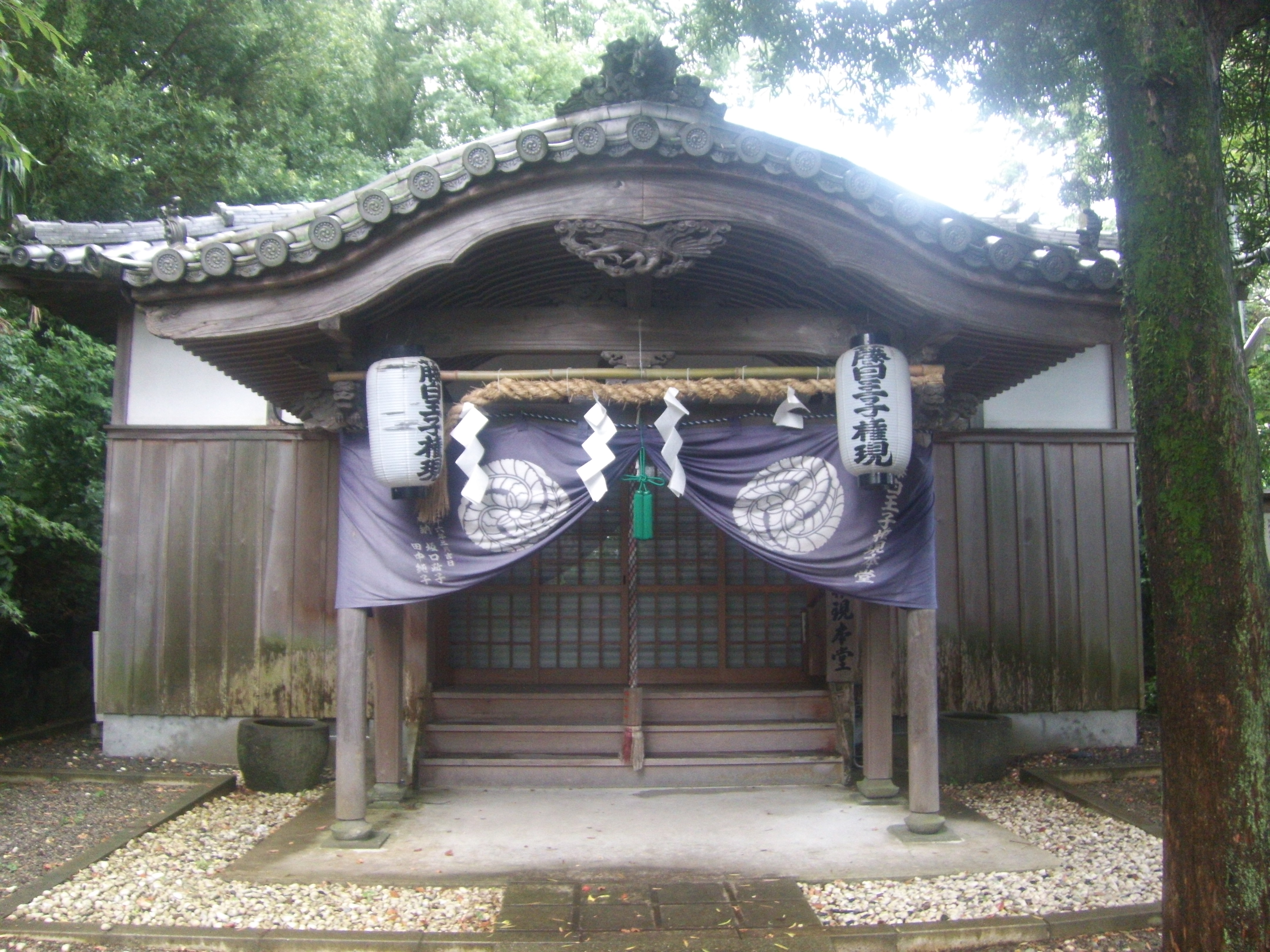 熊野古道・紀伊路の九十九王子の一つ藤代王子社（和歌山県海南市）